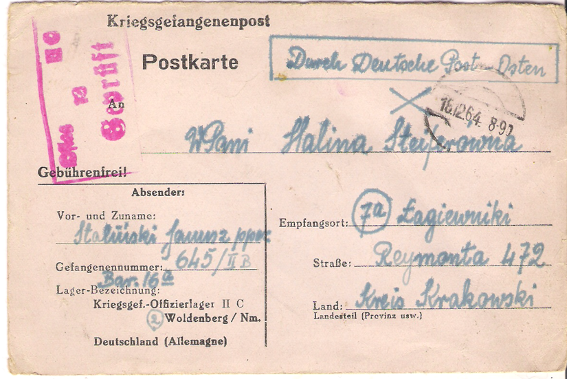 Korespondencja ppor. mar. Janusza Stalińskiego z oflagu IIc Woldenberg